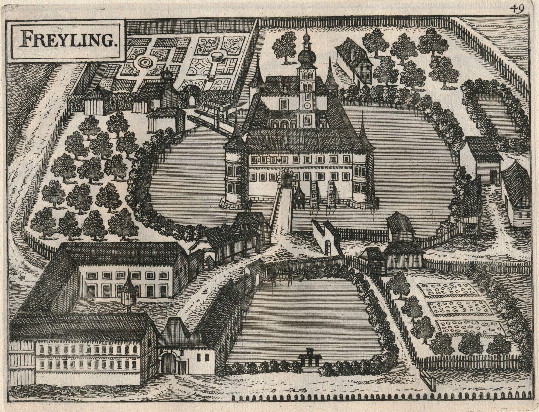 Stich des Wasserschlosses Freiling im gleichnamigen Ofteringer Ortsteil